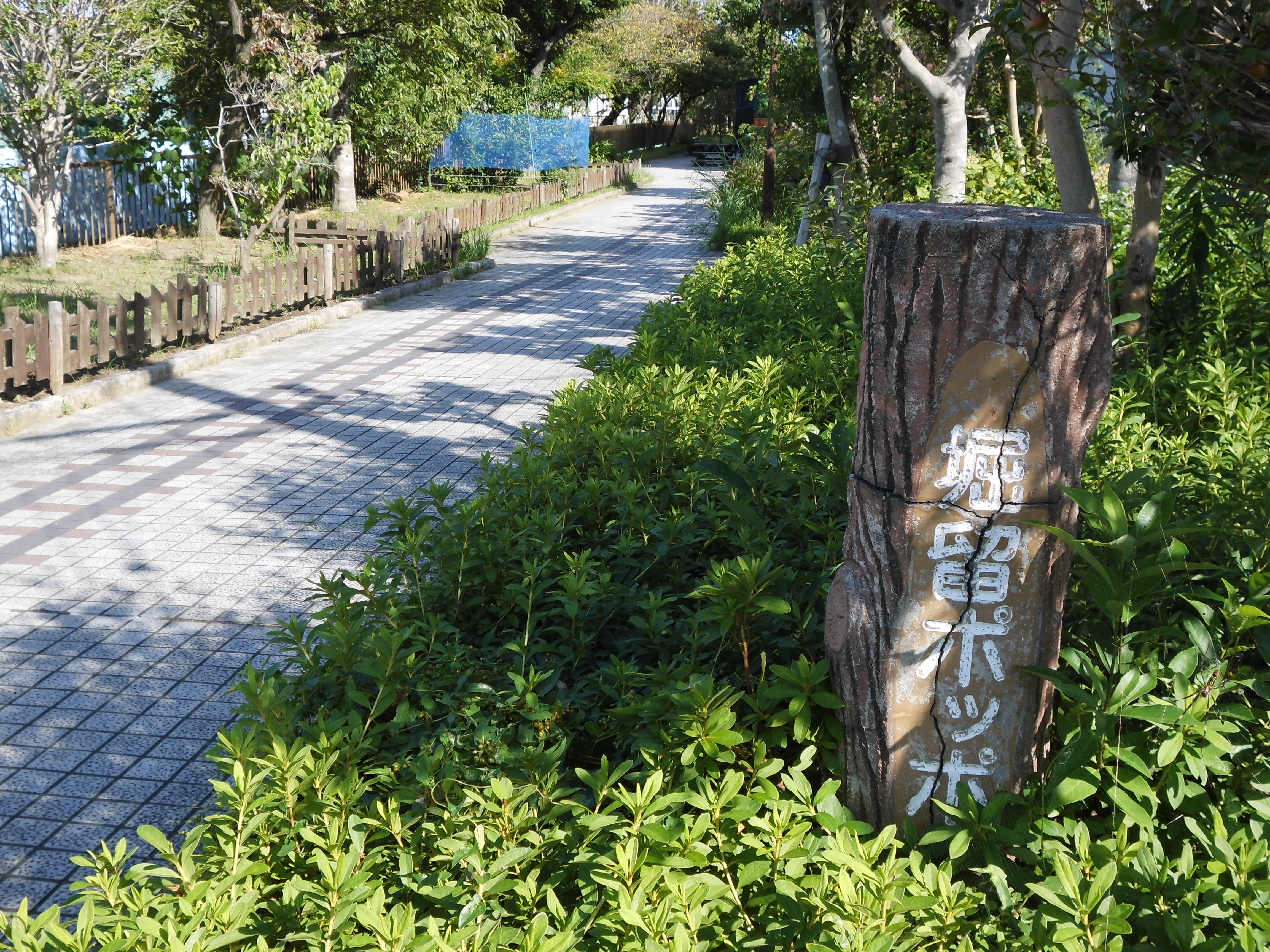 浜松工場への引込線跡を整備した堀留ポッポ道